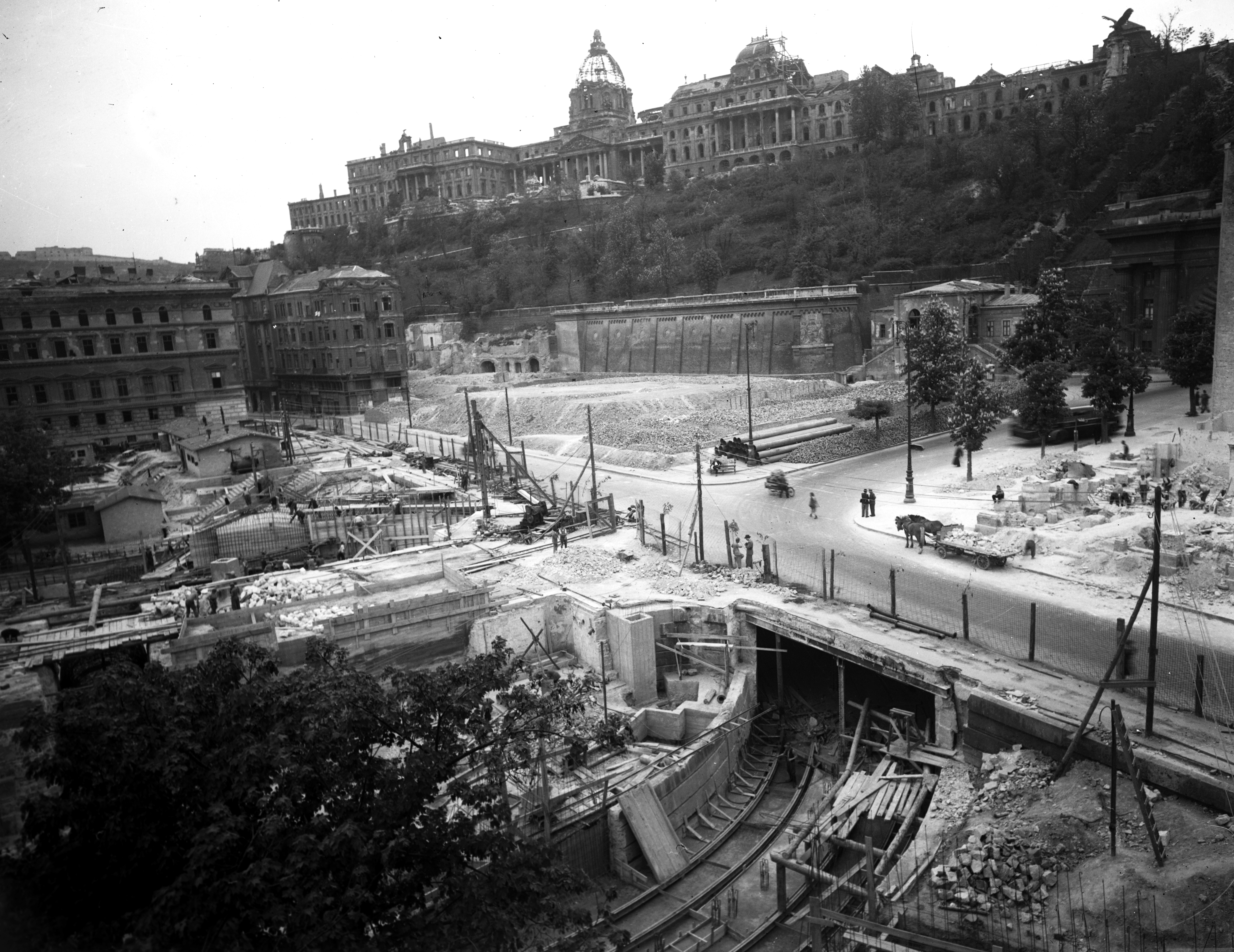 1949. Clark Ádám tér, háttérben a romos Királyi Palota.